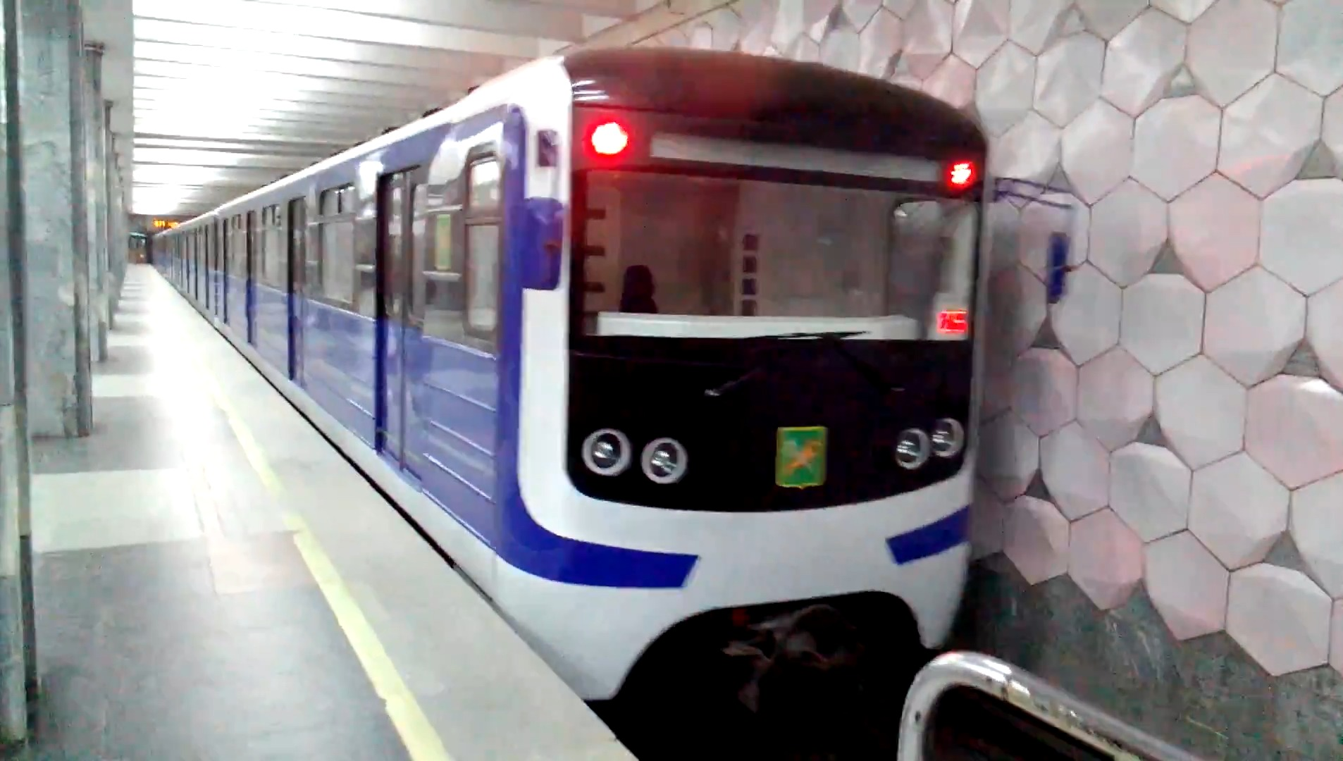 Электропоезд метро Еж3 типа 81-710.1 отправляется от станции Дворец спорта Харьковского метрополитена